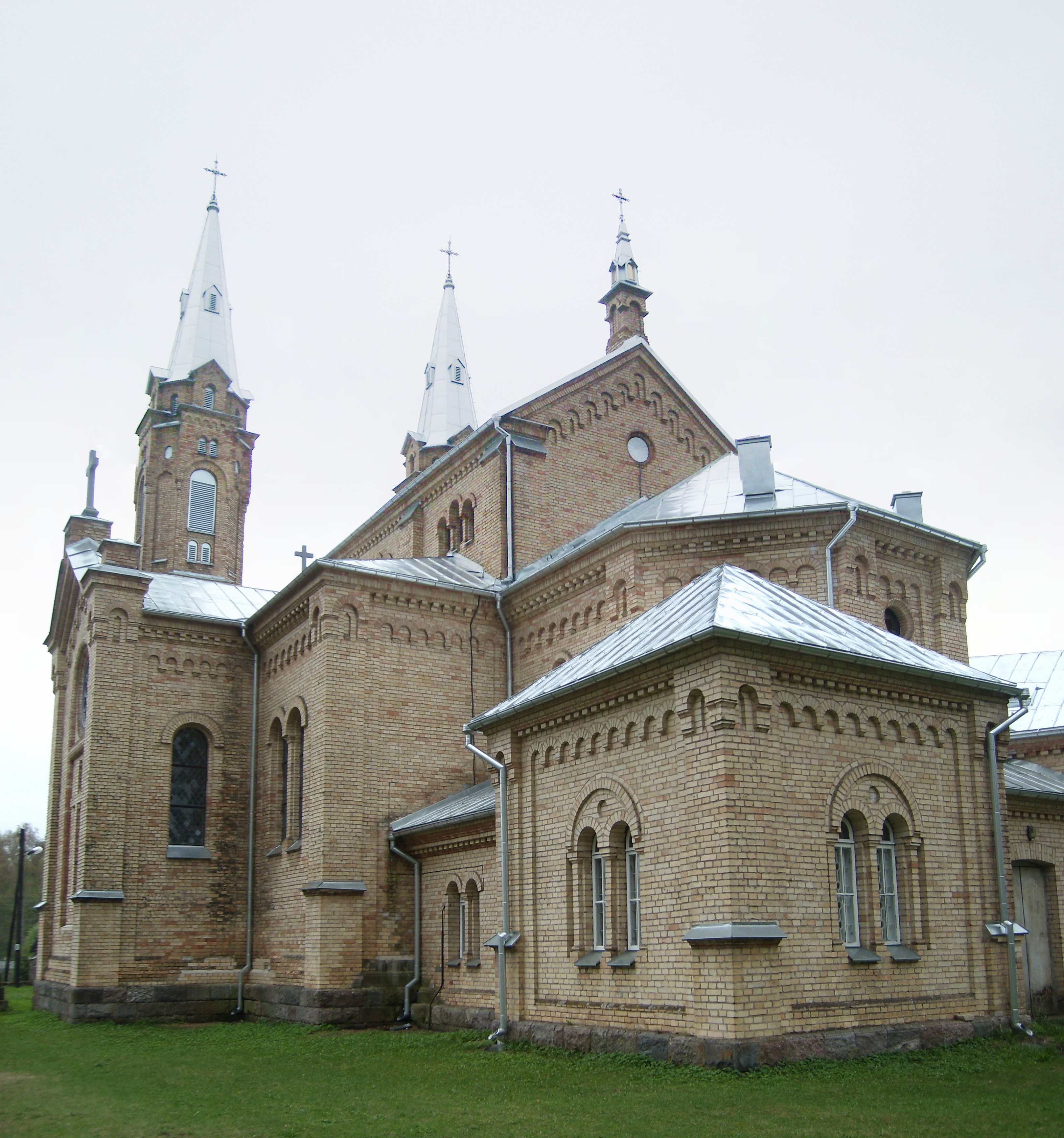 Беларуская (тарашкевіца): Міхайлаўскі касьцёл. в. Белагруда This is a photo of Belarusian heritage monument. Reference number: 412Г000339 ( WLM)